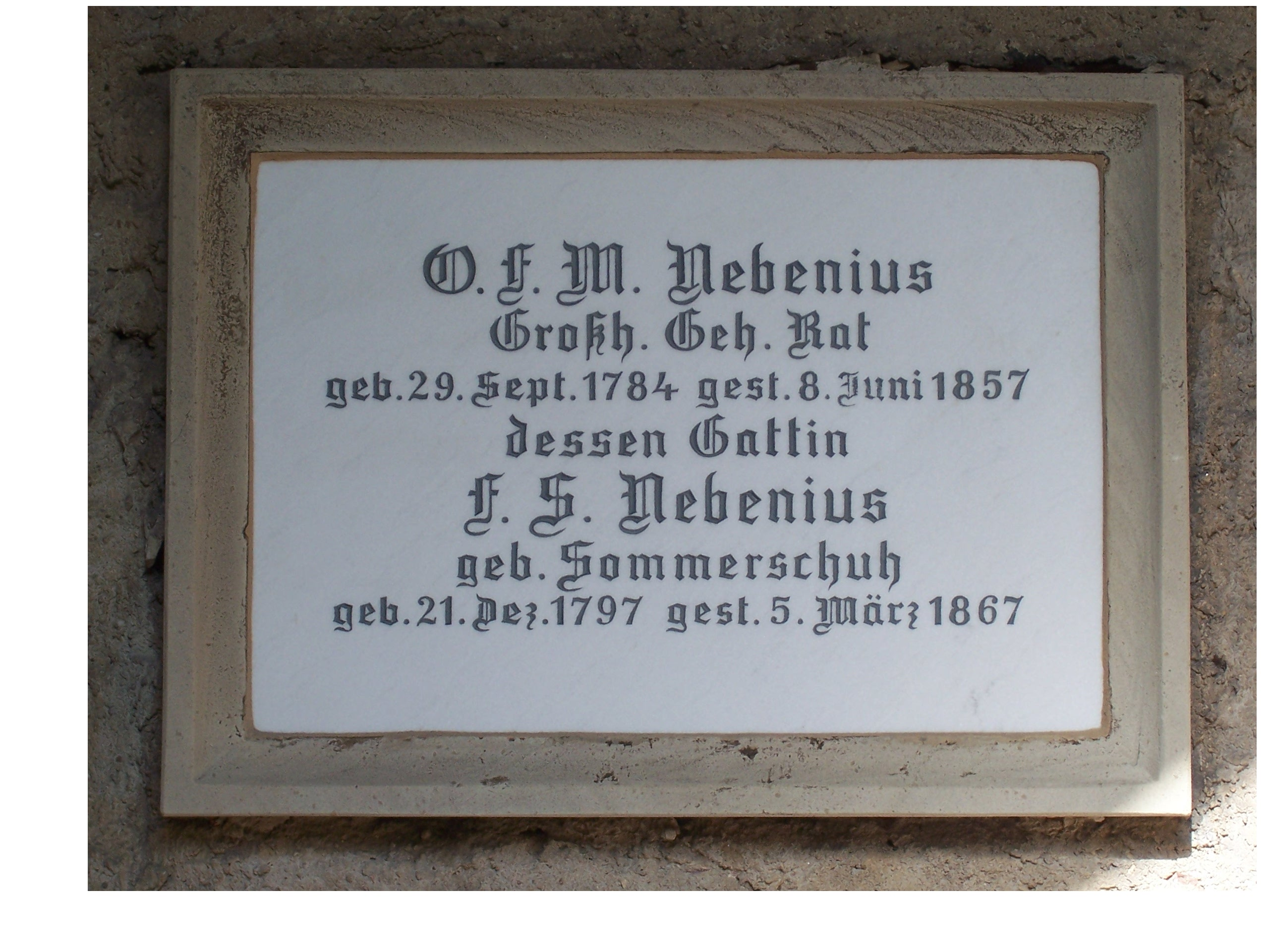 Grabplatte von Karl Friedrich Nebenius und seiner Gattin an der Gruftenhalle, alter Friedhof in Karlsruhe